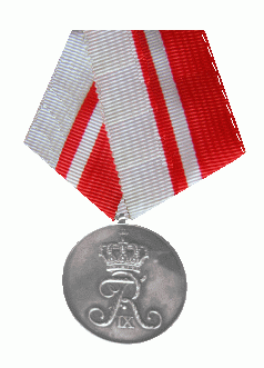 Medaille voor Landurige Dienst in de Bevolkingsbescherming Hæderstegnet for 25 års god tjeneste i Civilforsvaret